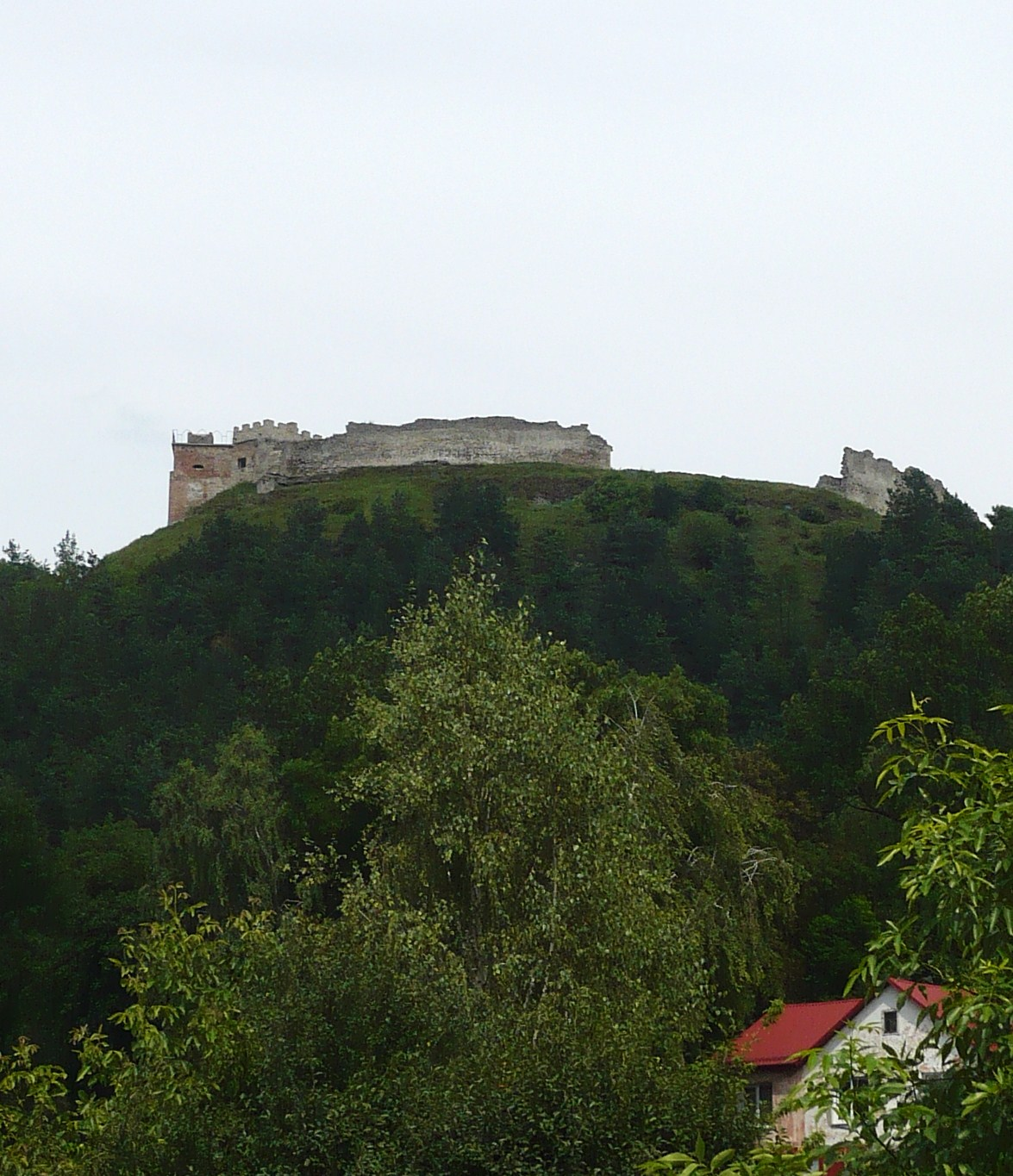 Zamek w Krzemieńcu